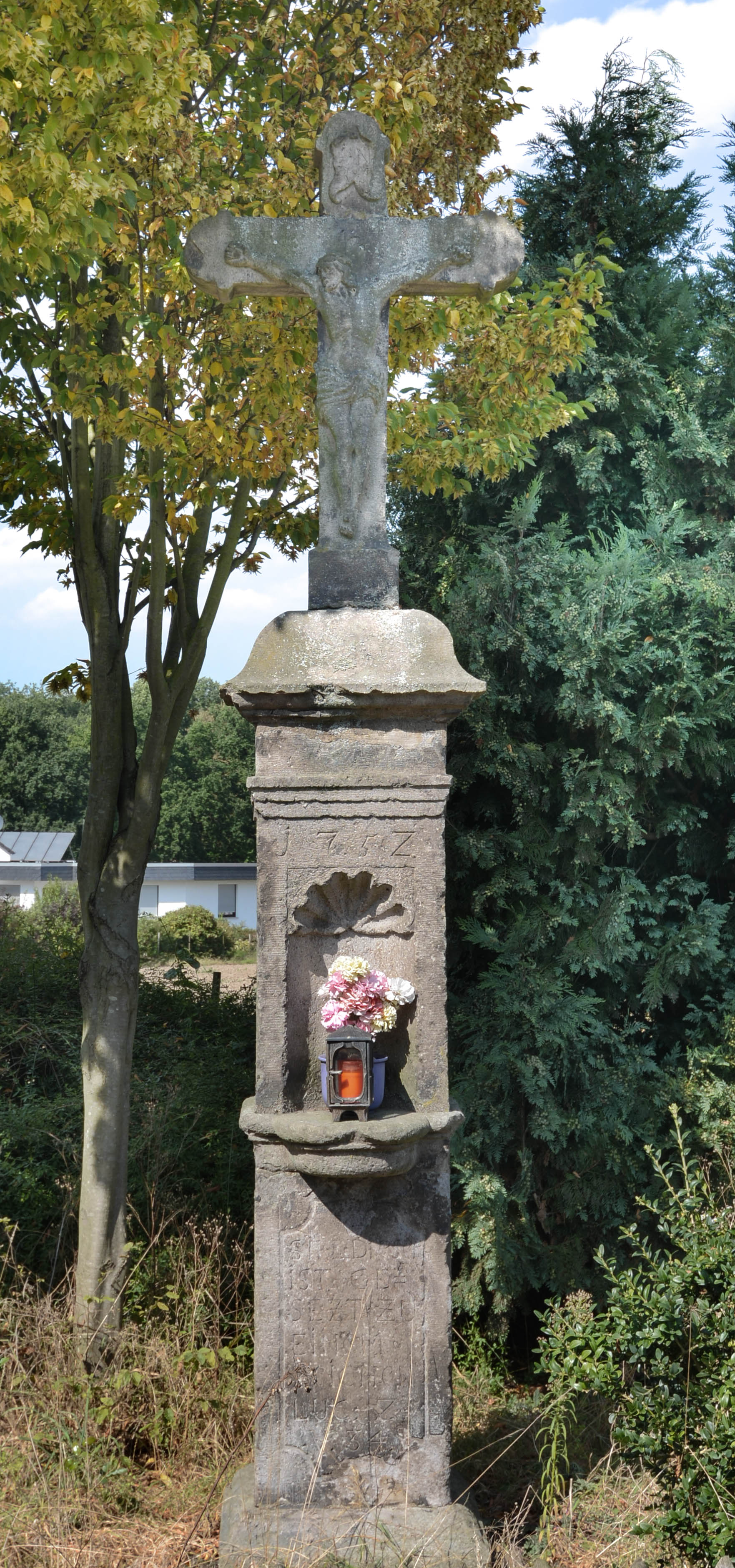 Wegekreuz Virneburg an der Alte Schulstraße.This is a photograph of an architectural monument., no. B 014